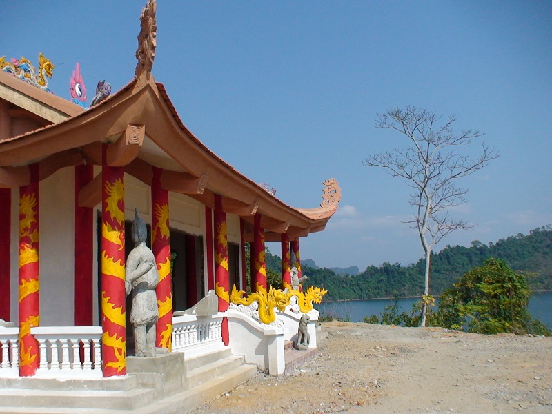 Đền Pác Tạ ngày nay